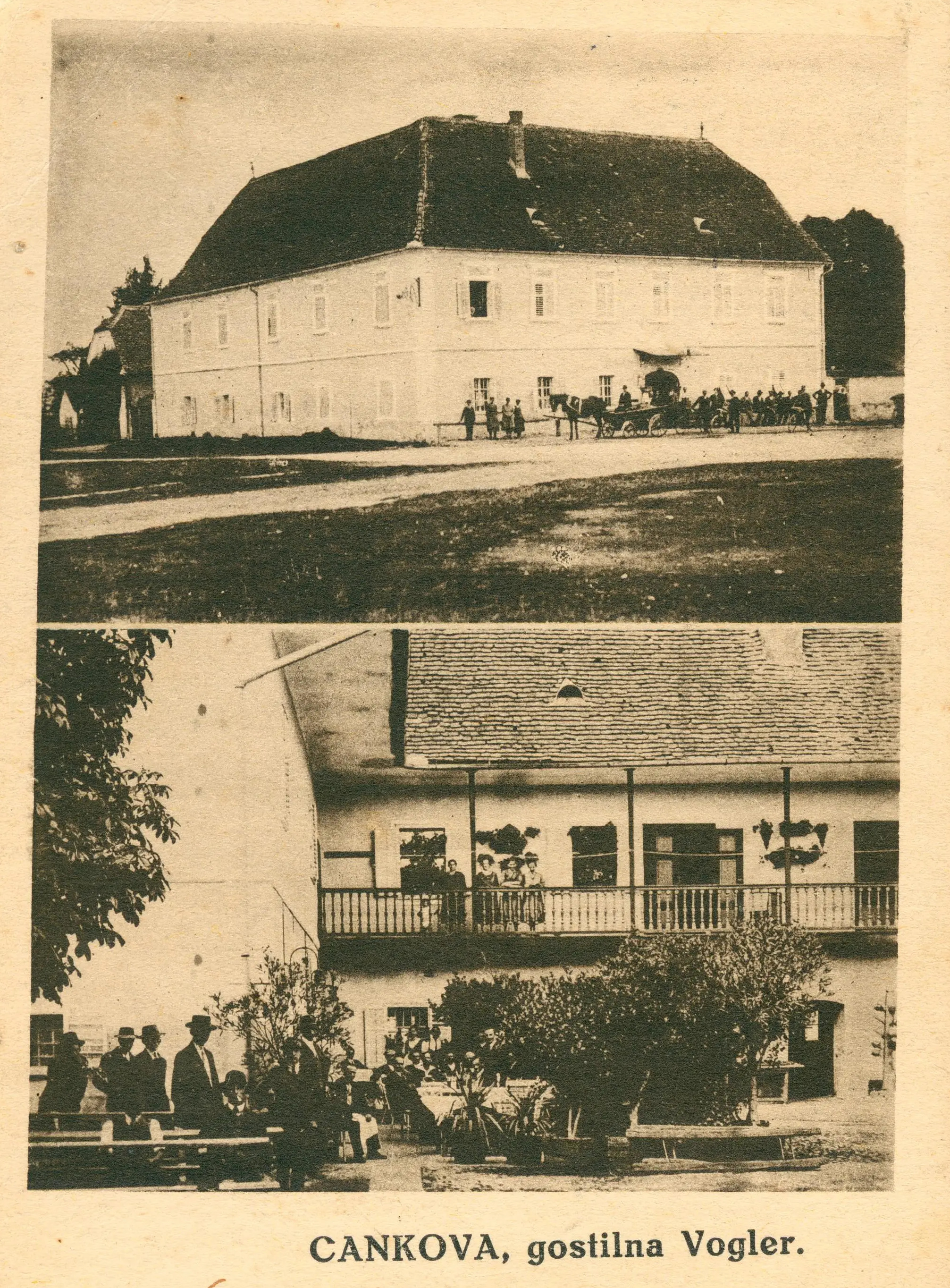 Gostilna družine Vogler. Razglednica iz prve polovice 20. stoletja.